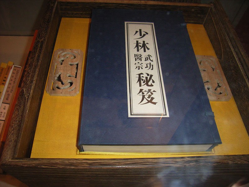 Shaolin_yizong_wugong_miji A Chinese book